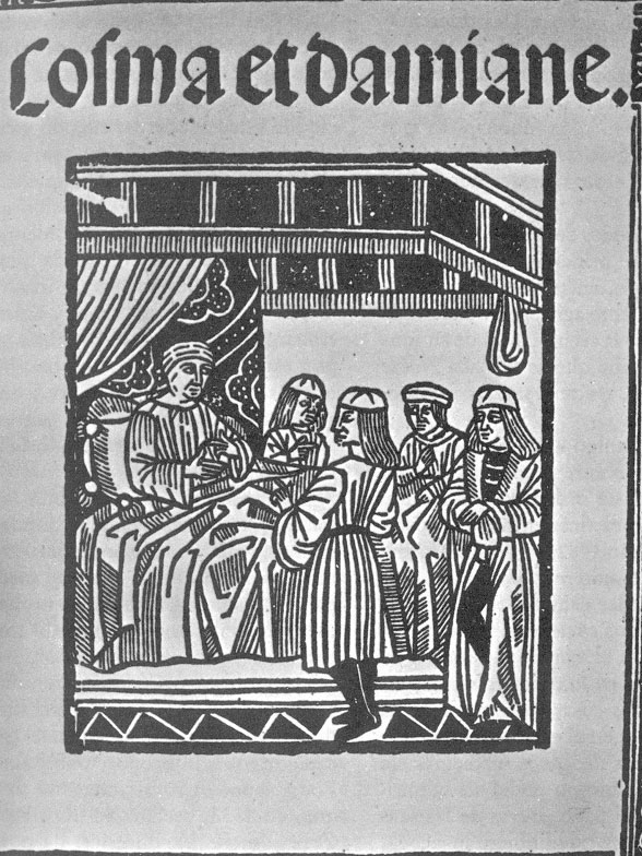 santos cosme y damian